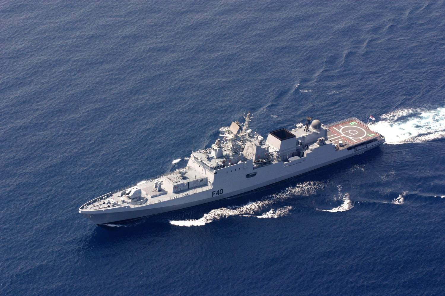 INS Talwar